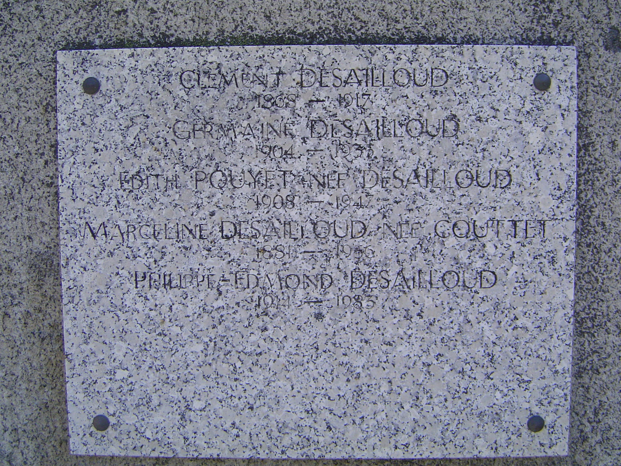 Photo prise au cimetière de Chamonix-Mont-Blanc (France)